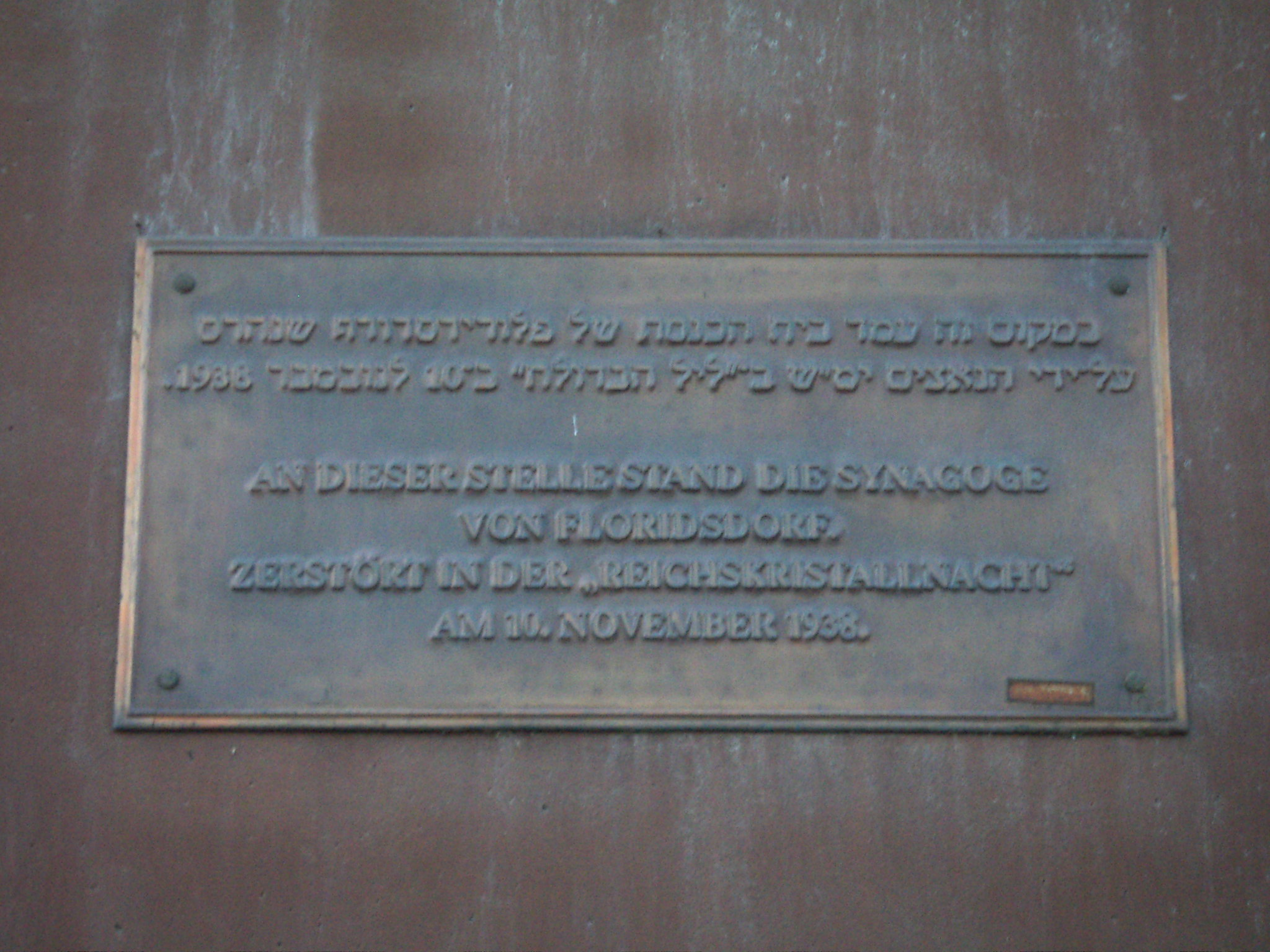 Gedenktafel zur ehemaligen Synagoge Floridsdorf in der Freytaggasse